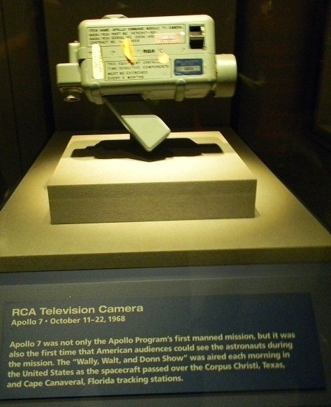 Apollo 7 RCA camera au Kennedy Space Center.